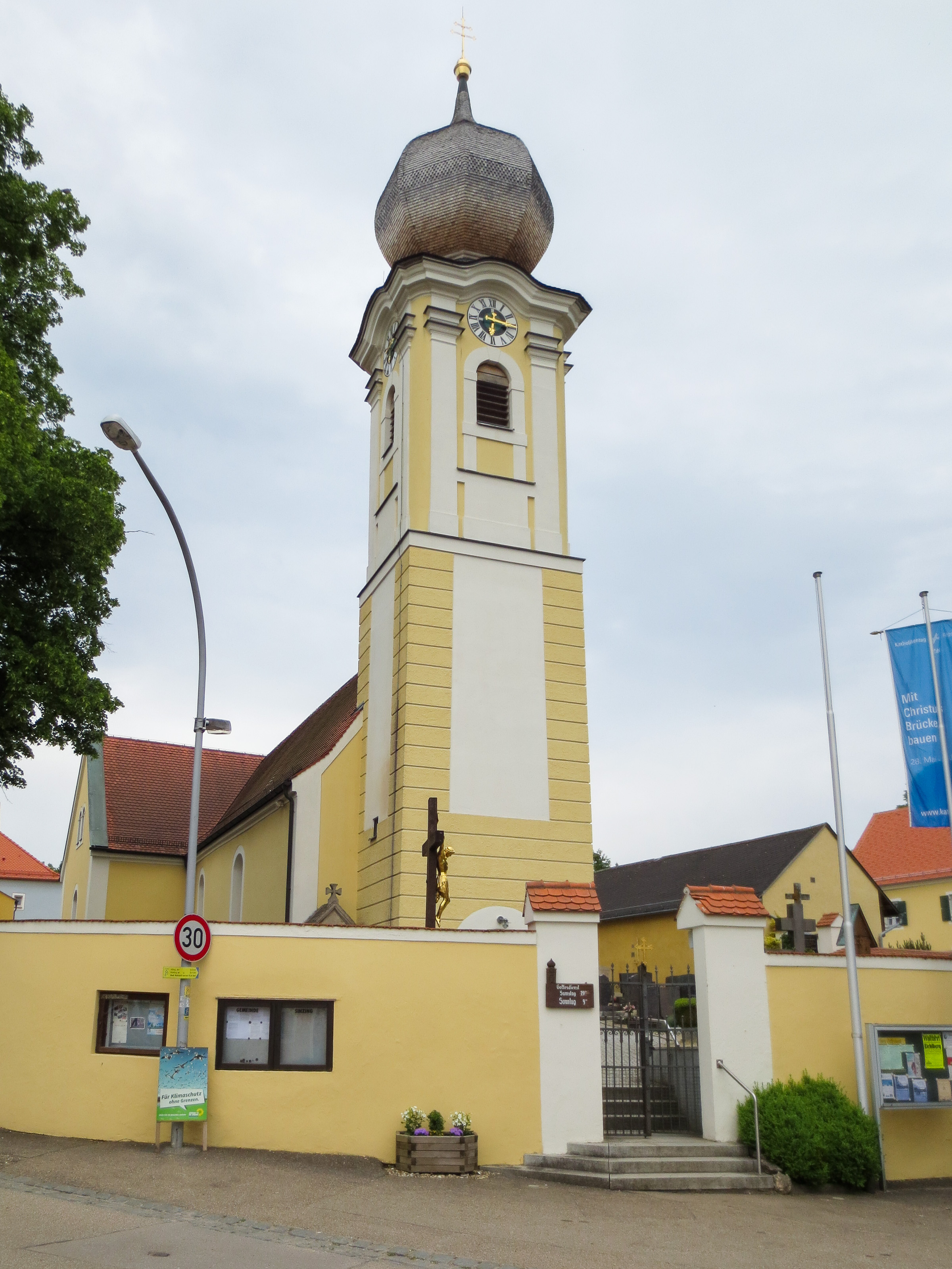 Katholische Pfarrkirche St. Wolfgang: Saalbau mit Querhaus, abgewalmtem Satteldach, Westturm mit Zwiebelhaube und Putzgliederungen, Langhaus romanisch, Westturm 1749, Querhaus und Apsis 19. Jahrhundert; mit Ausstattung; Friedhofsmauer, wohl 16./17. Jahrhundert. This is a photograph of an architectural monument.